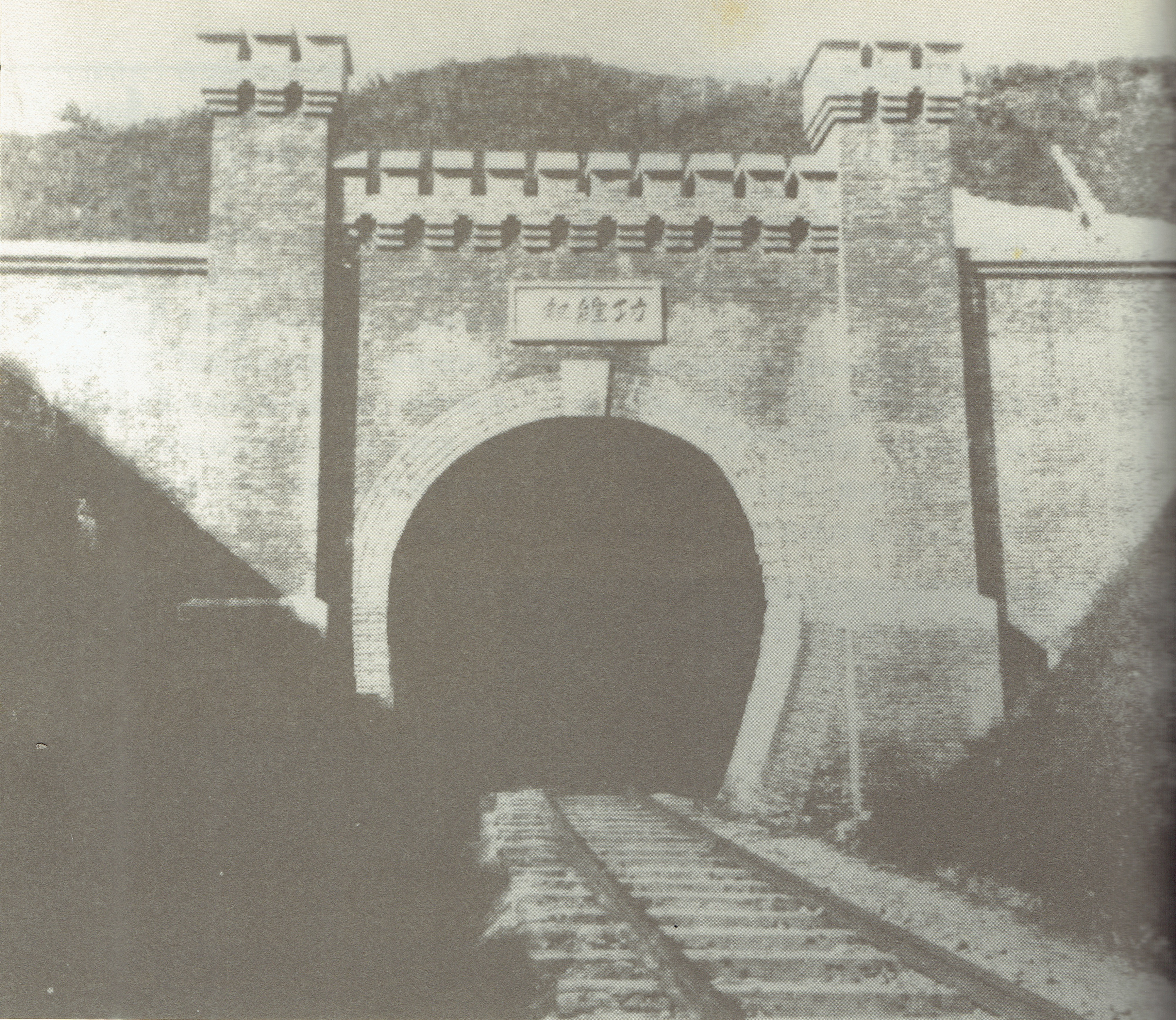 舊臺中線鐵路隧道。